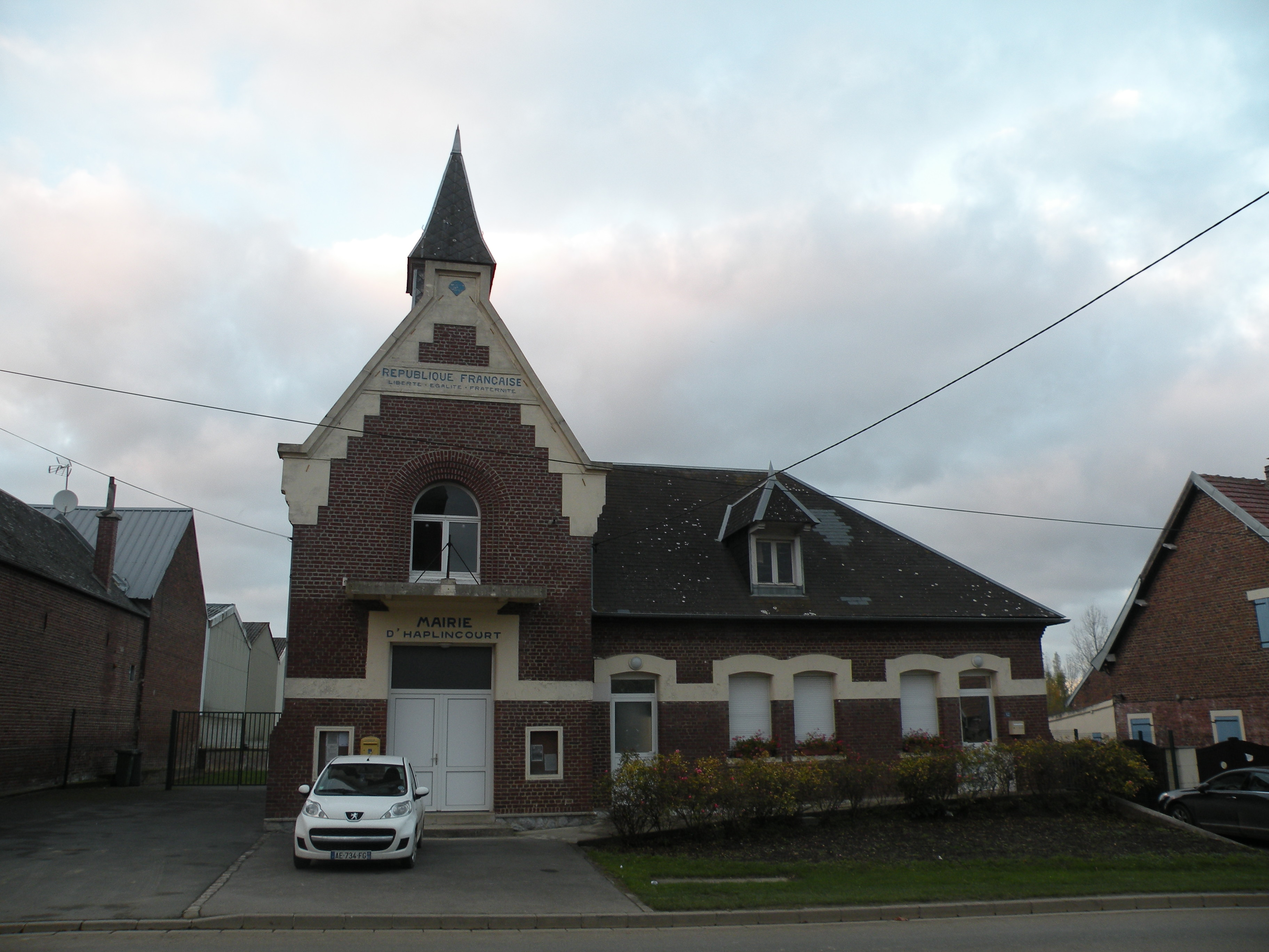 mairie d'Haplincourt